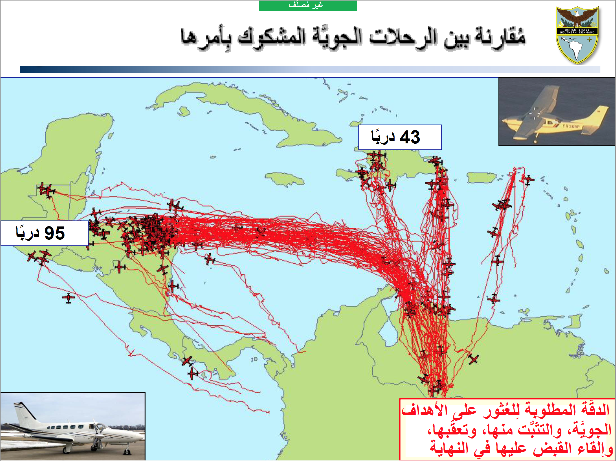 خارطة تعود لِسنة 2010 تُظهر مسار الرحلات الجويَّة المشكوك بأنَّها تُهرِّب المُخدرات.